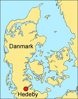 Kart over Hedeby og Danmark.